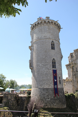 chateau de mMehun